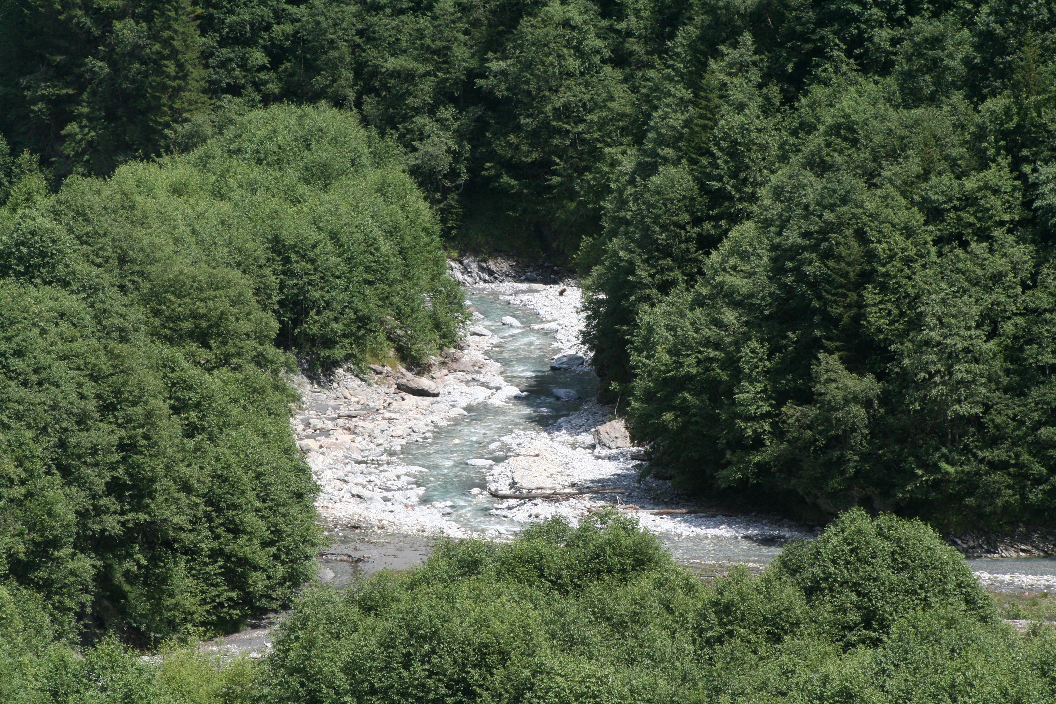 Die Rabiusa im Safiental